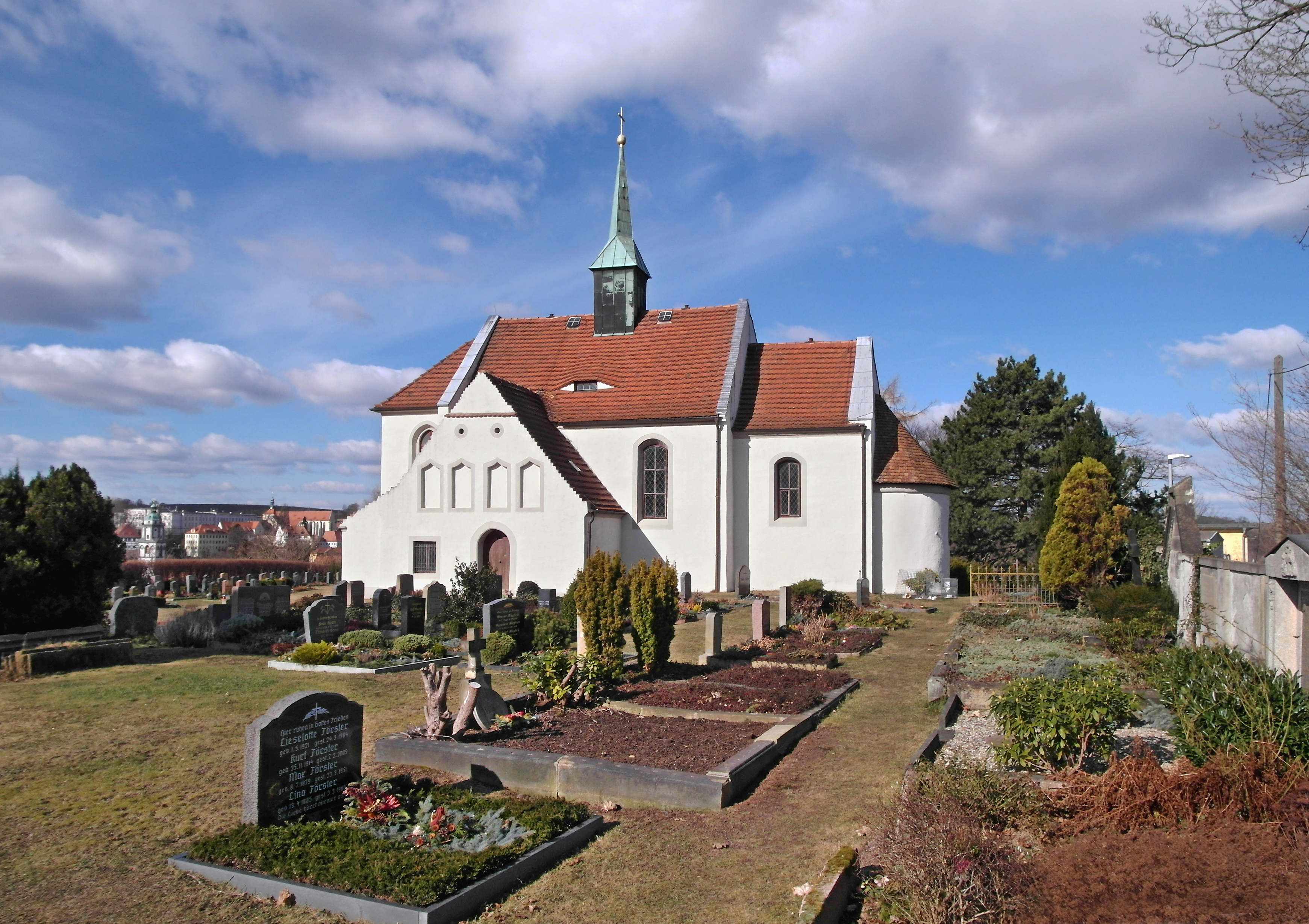 24.02.2018 01662 Meißen, Kapellenweg 4A auf dem Plossen: Die Kapelle St. Martin (GMP: 51.160254,13.476616) ist eine der ältesten Kirchen Meißens, bereits in der 2. Hälfte des 12. Jahrhunderts erbaut. Sicht von Süden. [SAM4298.JPG]20180224180DR.JPG(c)Blobelt